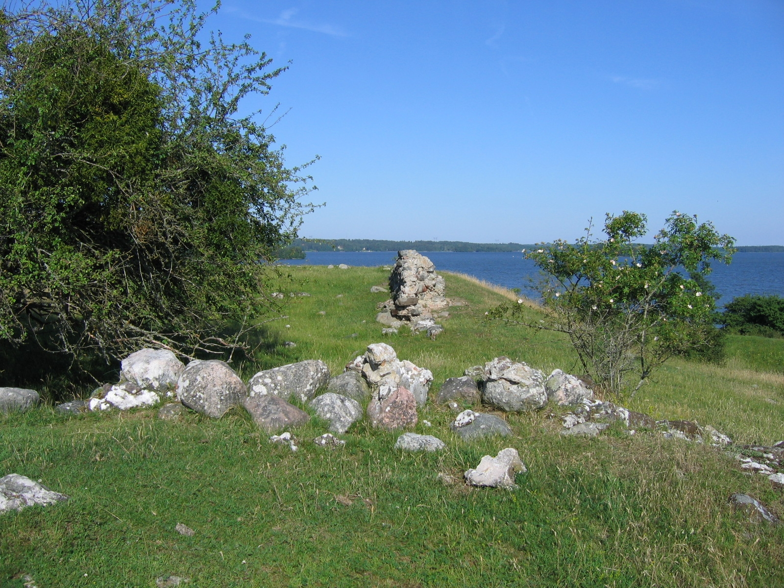 Sweden